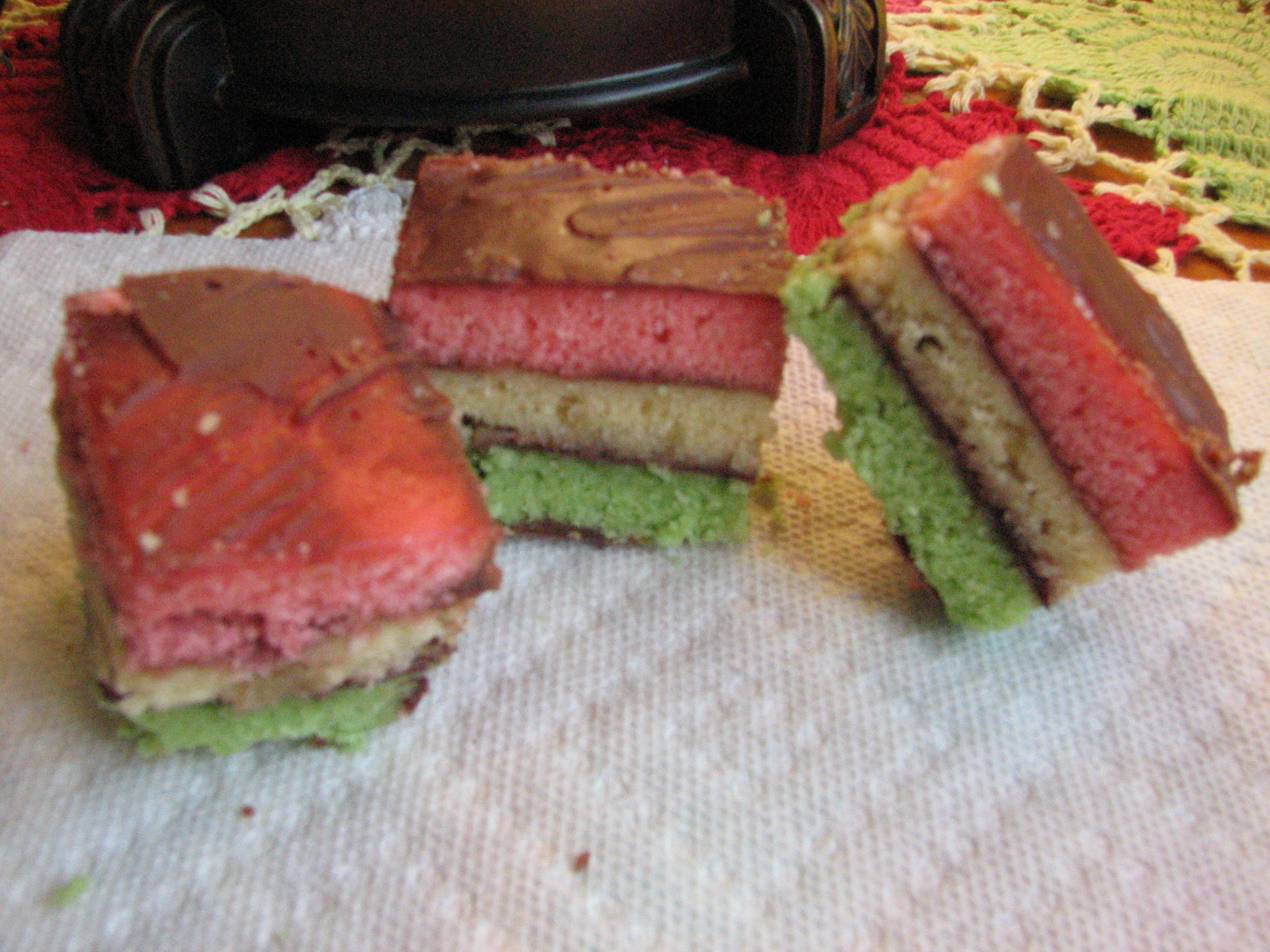 Rainbow cookies